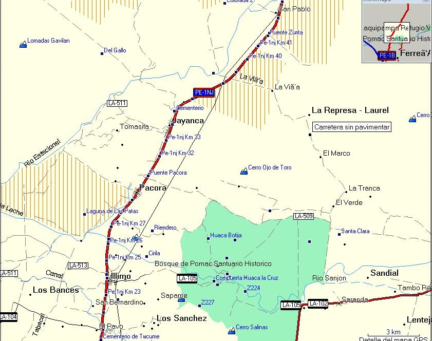 RUTA CHICLAYO -JAYANCA DETALLE GPS